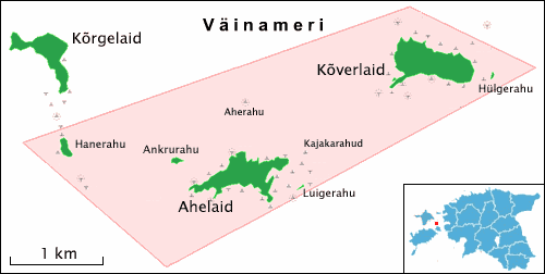 Hiiumaa laidude maastikukaitseala Laidelahe sihtkaitsevööndi kaart. Kaart on loodud Turbo Pascal programmiga, mis kasutas joonlauaga vanalt kaardilt mõõdetud andmeid. Pilditöötlusprogrammiga on juurde joonistatud sihtkaitsevööndi piirid. Väiksemad sümbolid tähistavad kive.